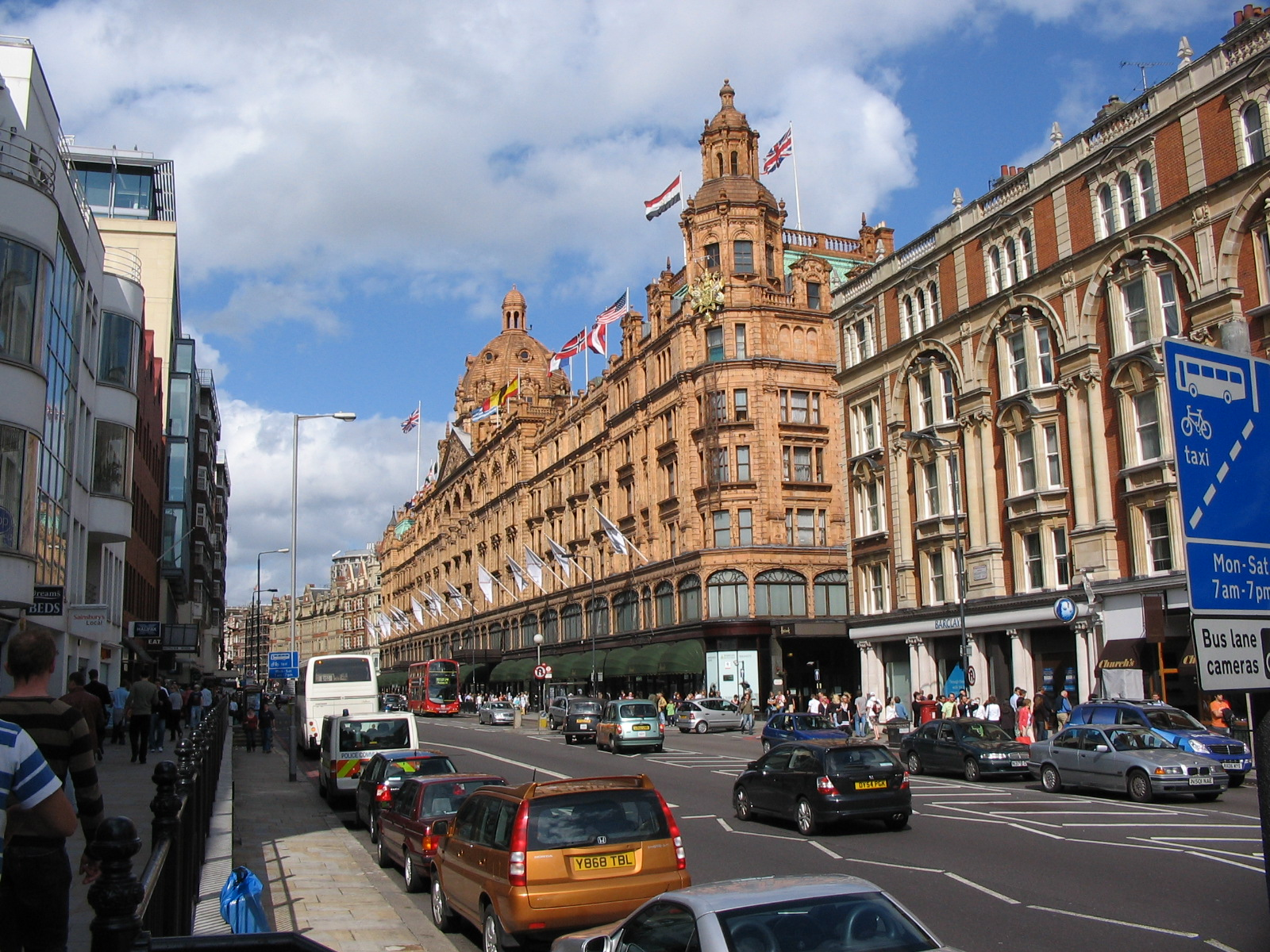 Harrods, London